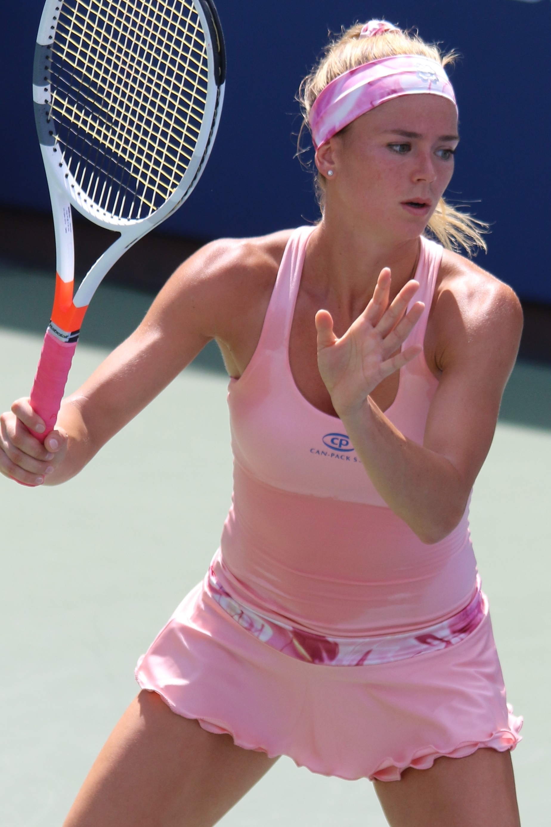 Giorgi US16 (20)